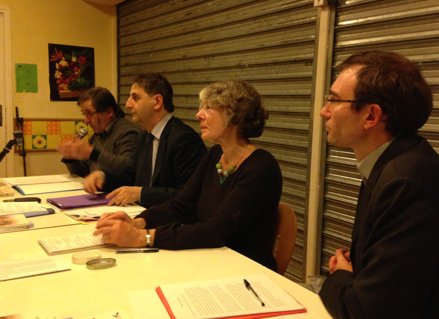 Débat sur l'ouverture du mariage aux couples de même sexe avec André Cuzon, le député Daniel Goldberg , Anne Soupa et Vincent Loiseau à Aulnay.